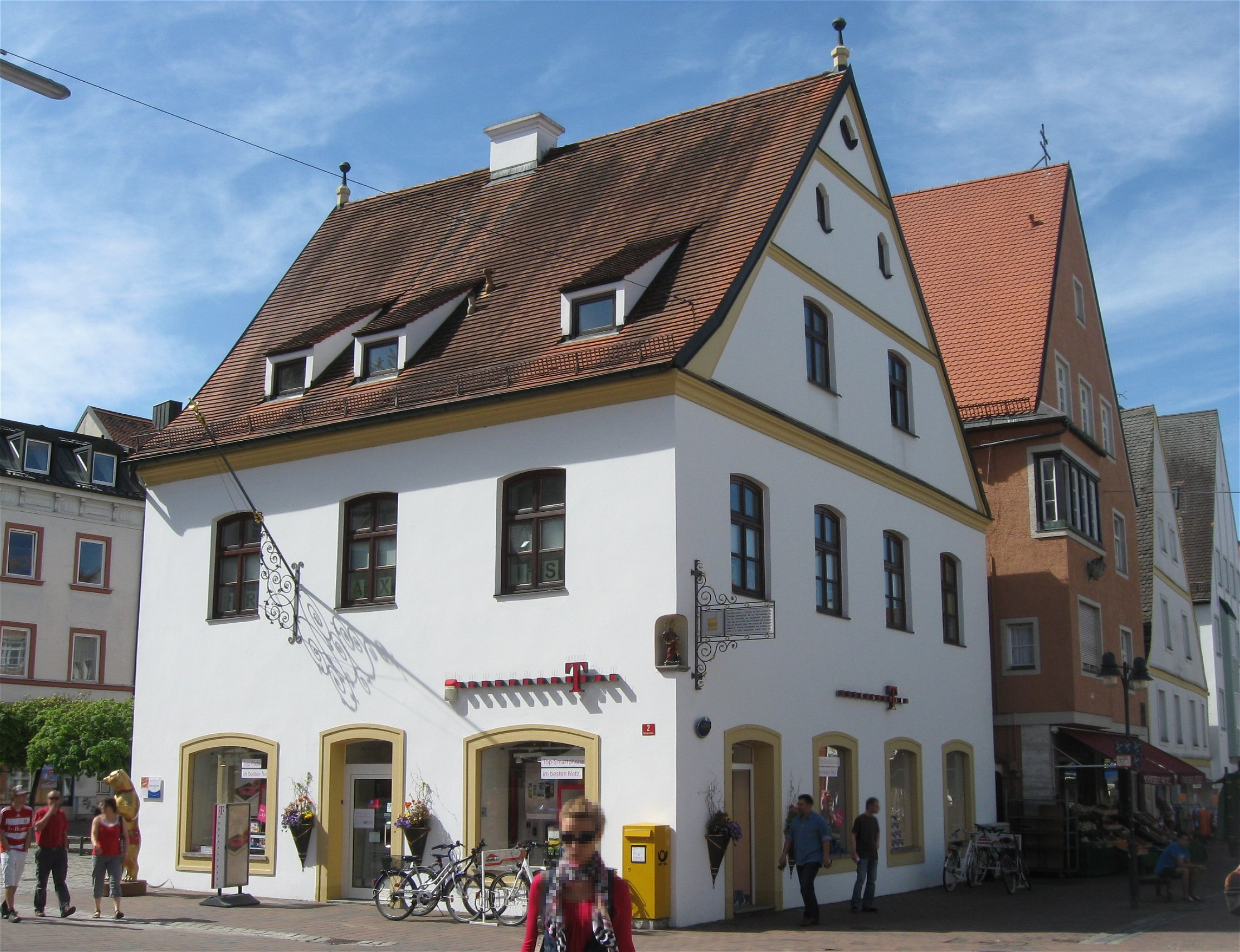 Bahnhofstraße 2; Domherrenhof. Ehem. fürstbischöfliche Hofsattlerei und Domherrenhaus, stattlicher zweigeschossiger Eckbau mit steilem Satteldach und Giebel mit Putzgliederung, im 17. Jh. über älterem Kern umgebaut. D-1-78-124-15